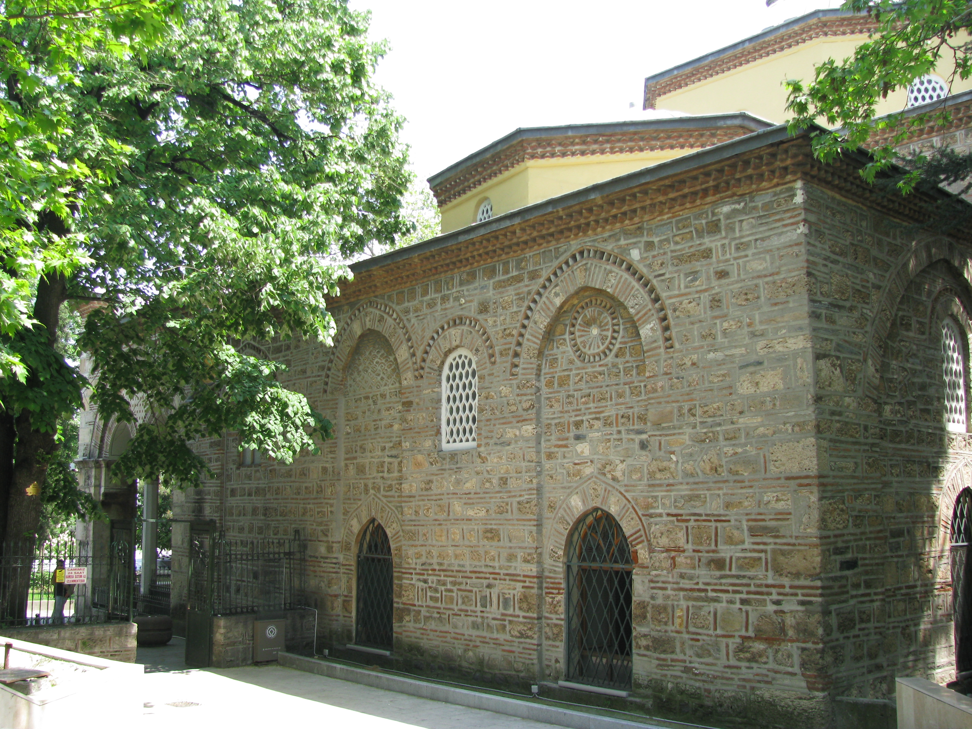 Gazi Orhan Camii Girişi